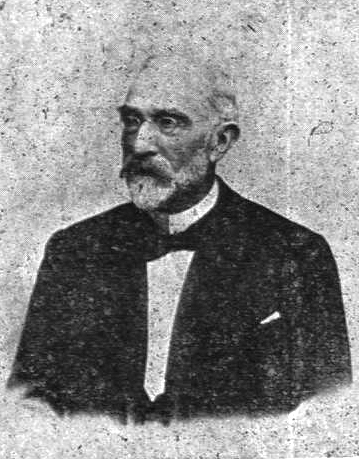 Xosé Pérez Ballesteros (1833-1918)